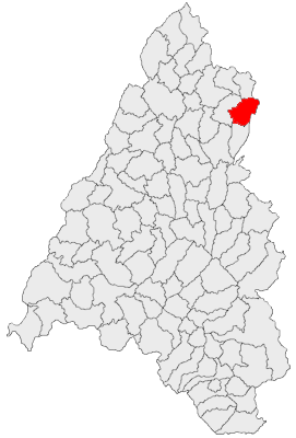 Categorie:Hărţi ale judeţului Bihor